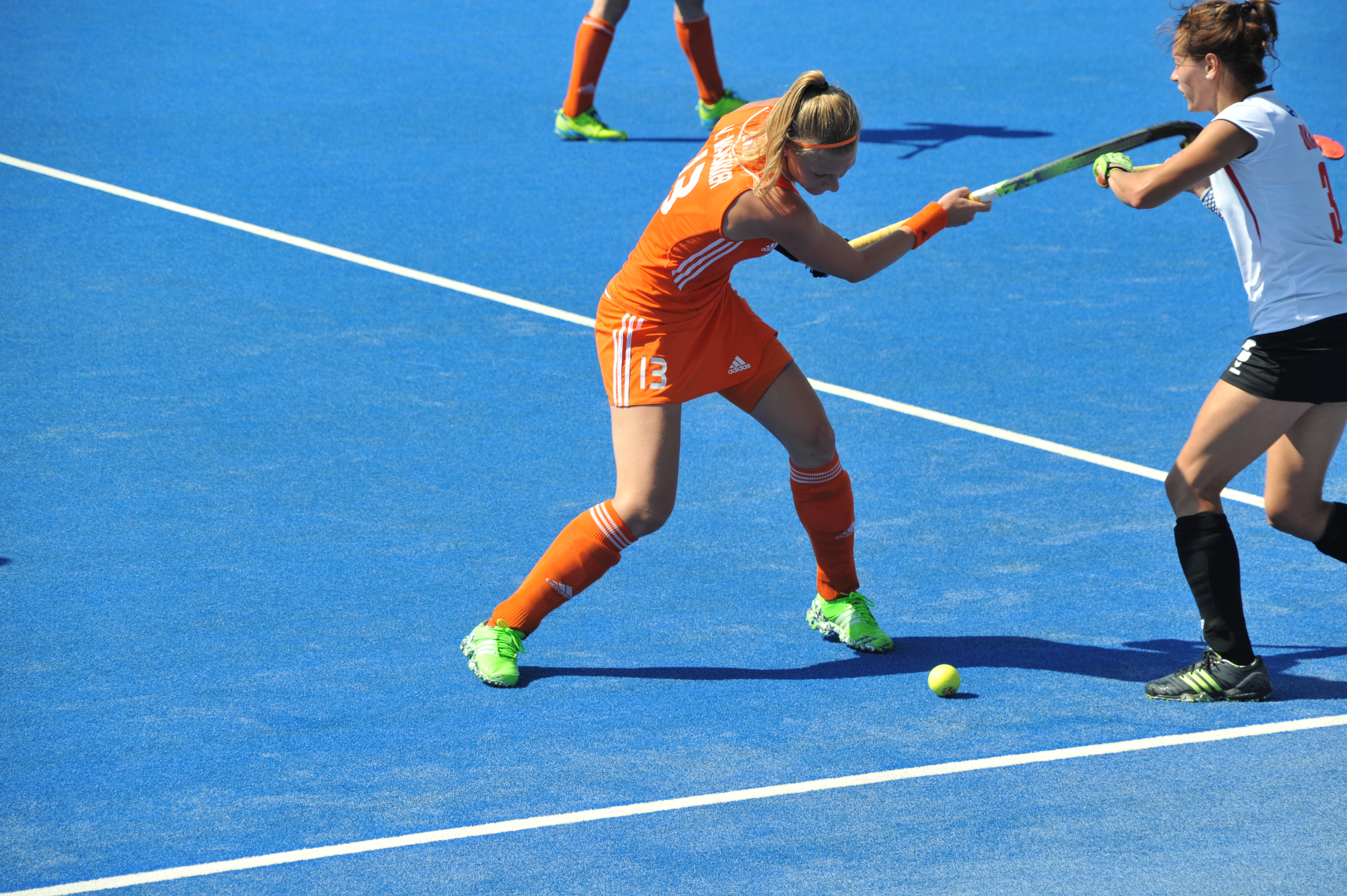 Caia van Maasakker